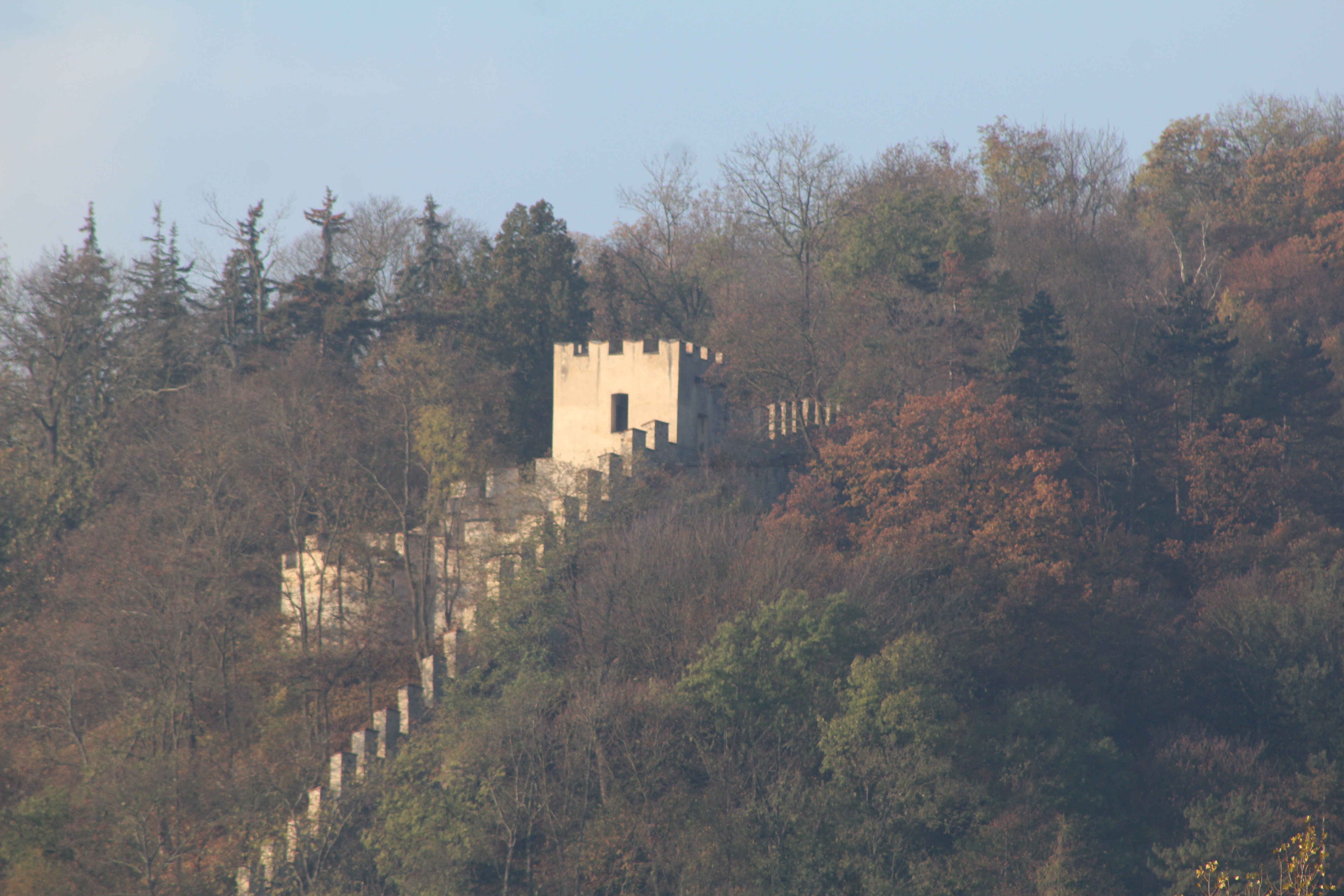 Mur de la Faim de Prague.